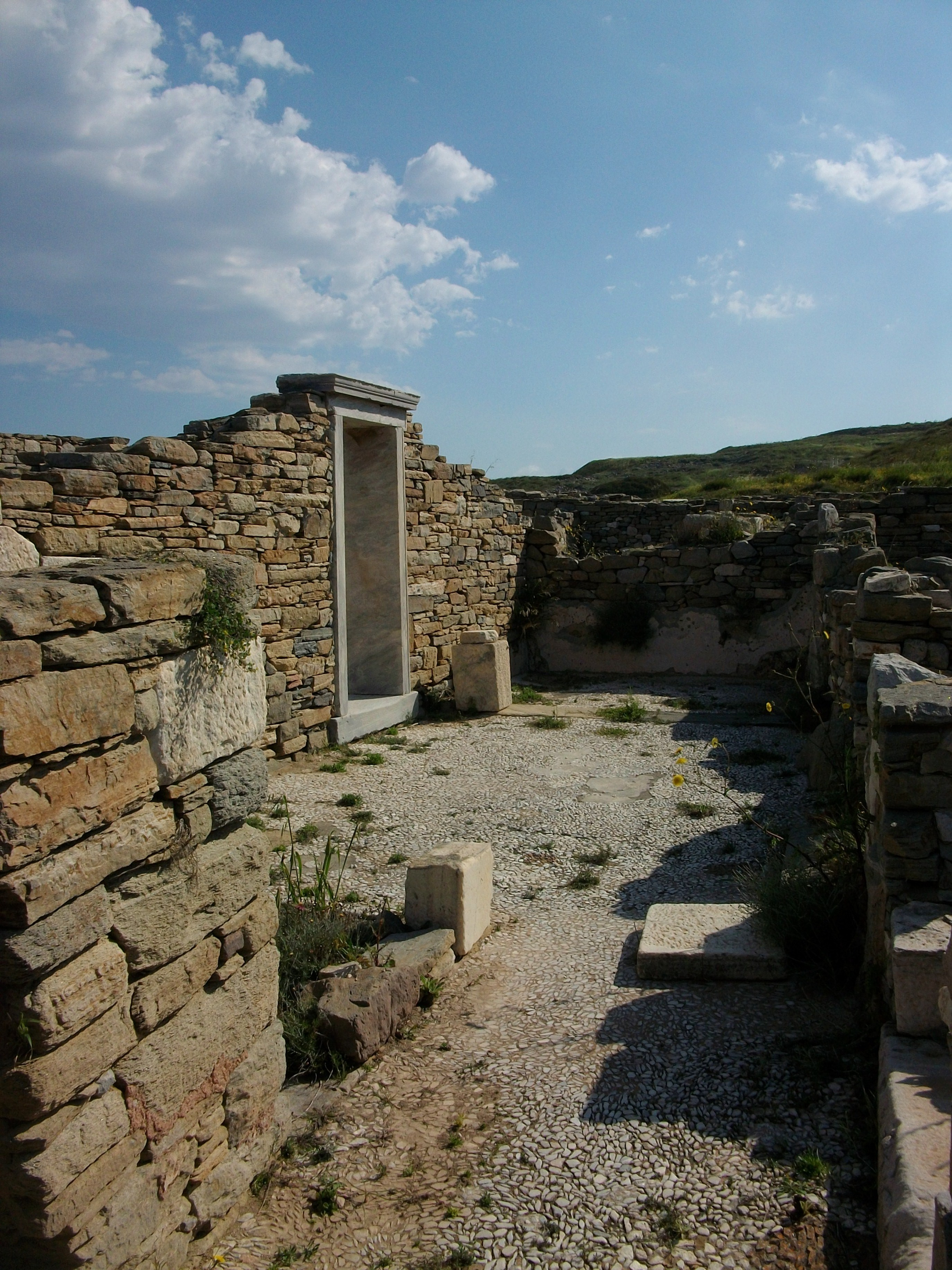 Casa del barri del teatre de Delos.